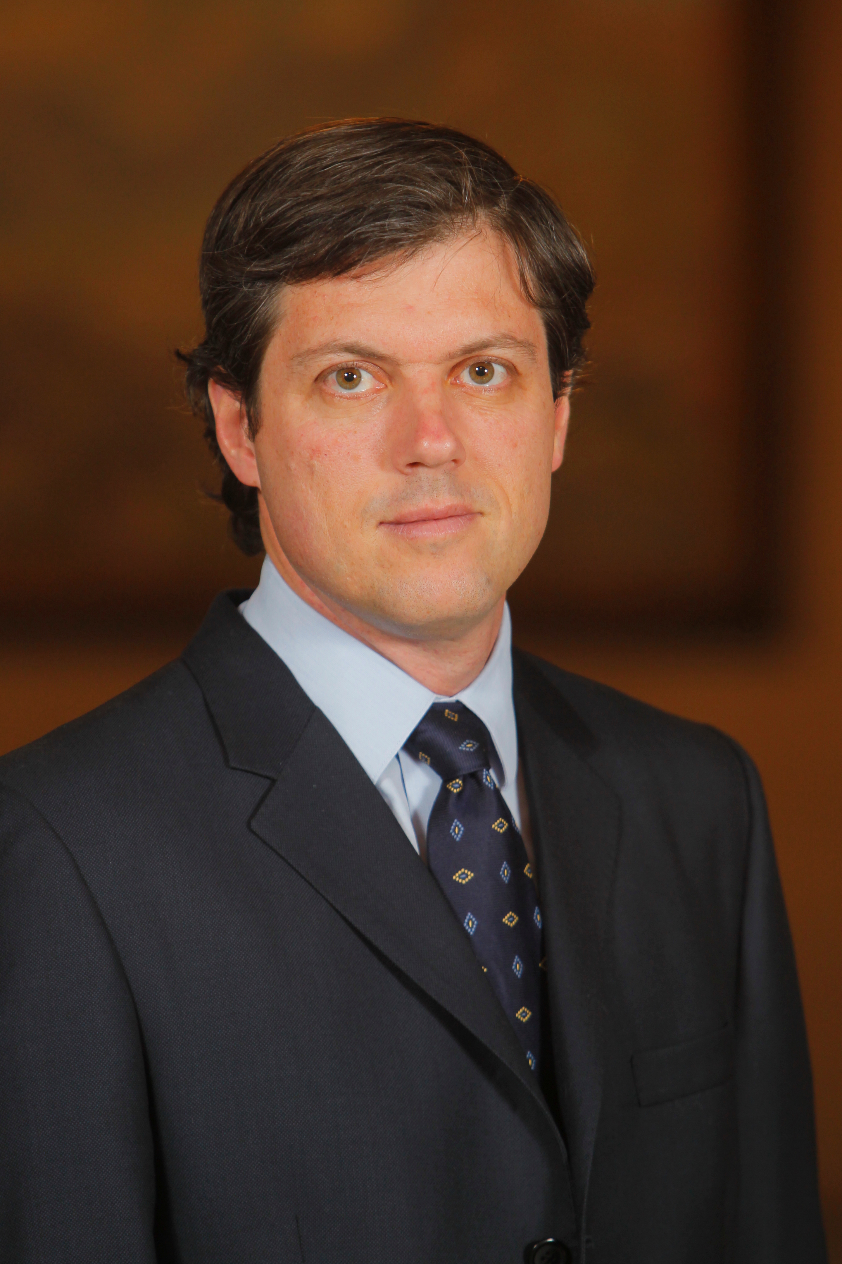 Vicepresidente del Banco Central de Chile